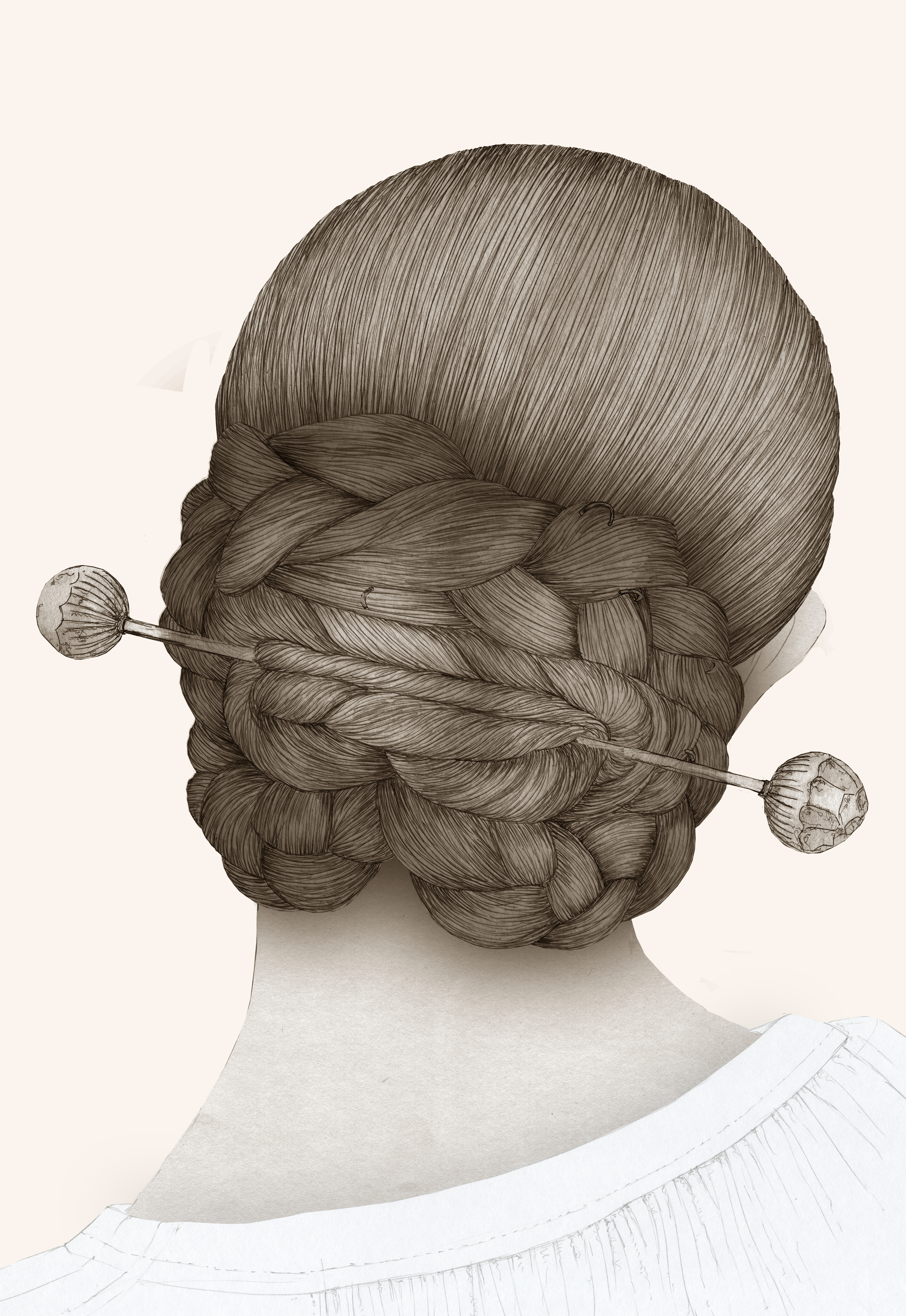 Imatges de l'exposició permanent "Horta i Marjal". Esta imatge, originàriament dissenyada per a l'exposició, no està en sala.